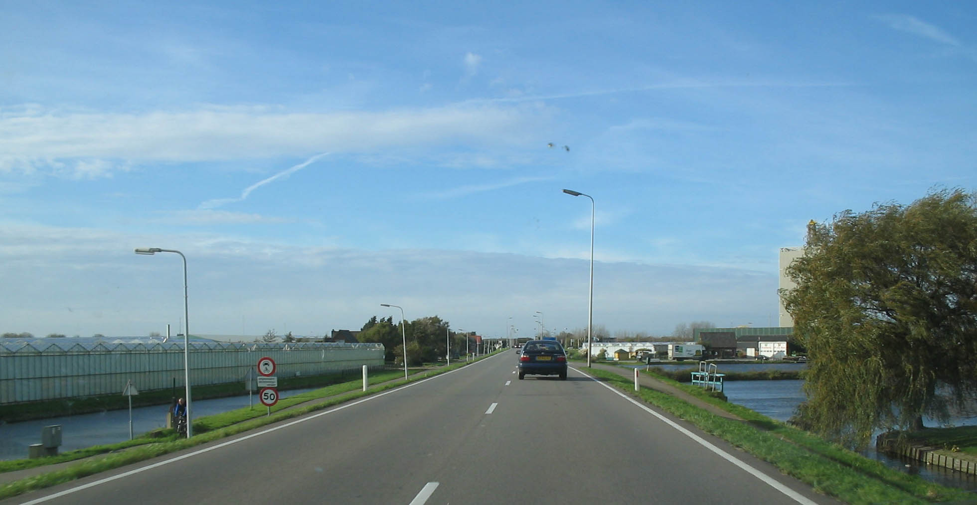 N220, bij Hoek van Holland, 6 november 2005